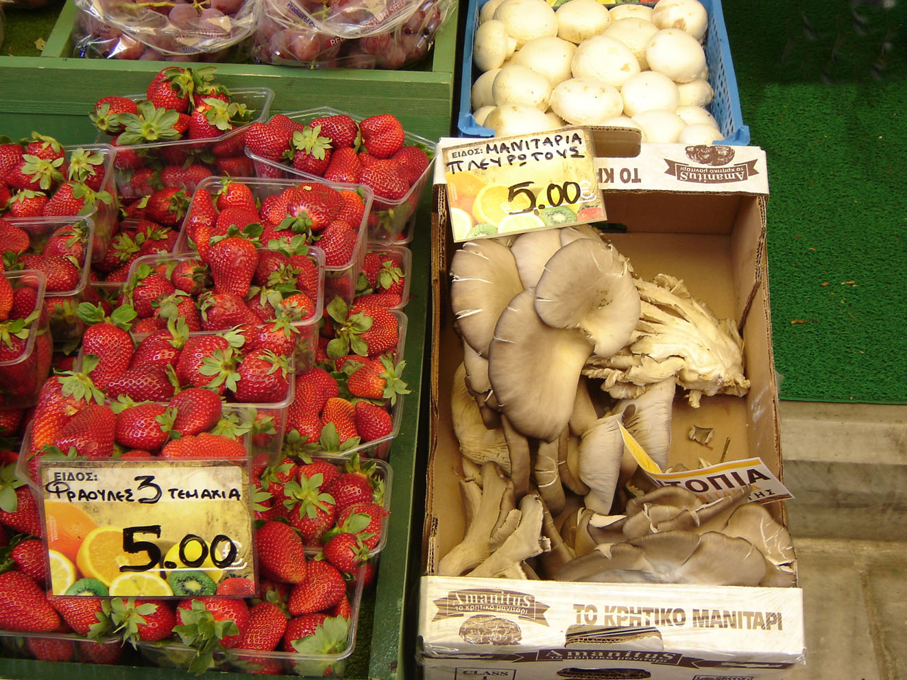 couleurs locales